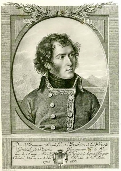 David Maurice Joseph Mathieu de la Redorte (1768-1833), général de division et comte de l'Empire. Il est représenté ici en uniforme de général de la Révolution.